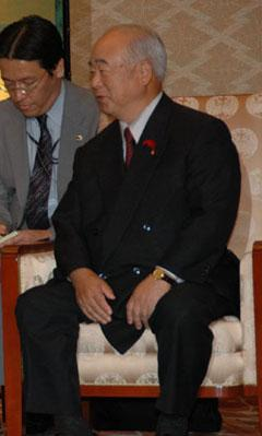 Fumio Kyuma